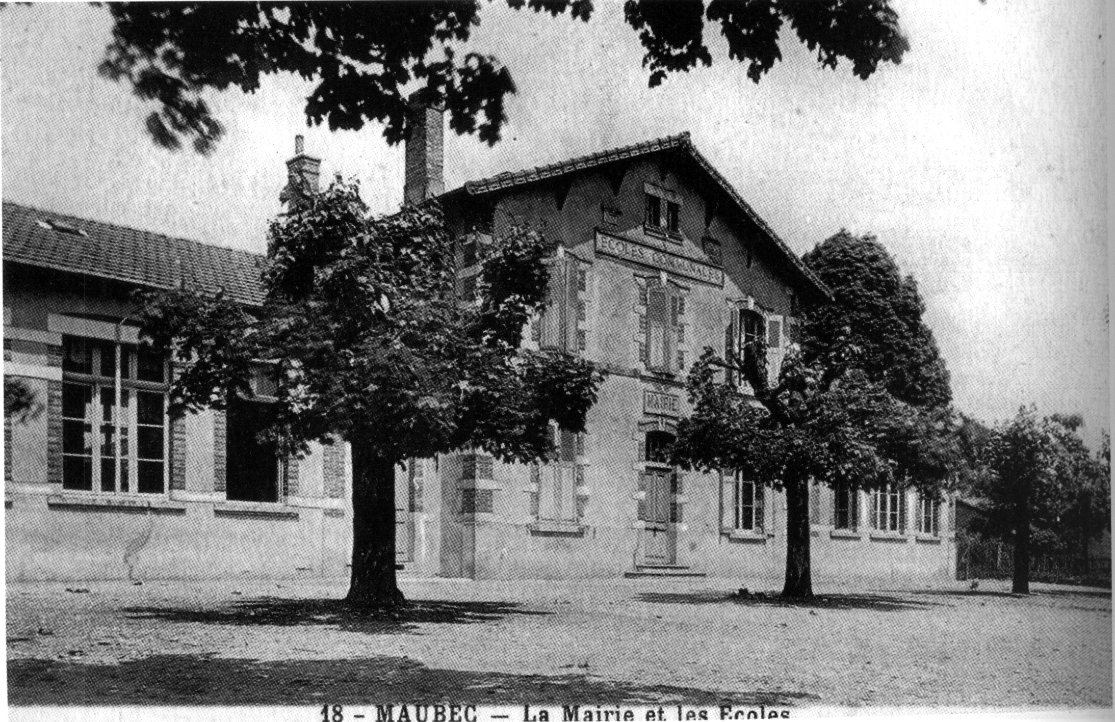 Maubec, la mairie et les écoles en 1925